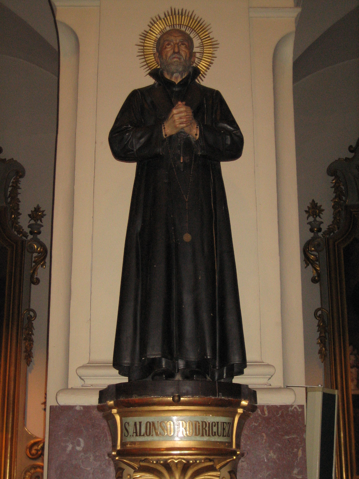 Talla del jesuita San Alonso ROdríguez Gómez, jesuita laico de Mallorca